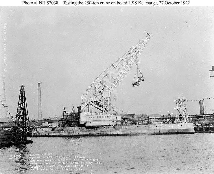 USS Kearsarge (AB-1)